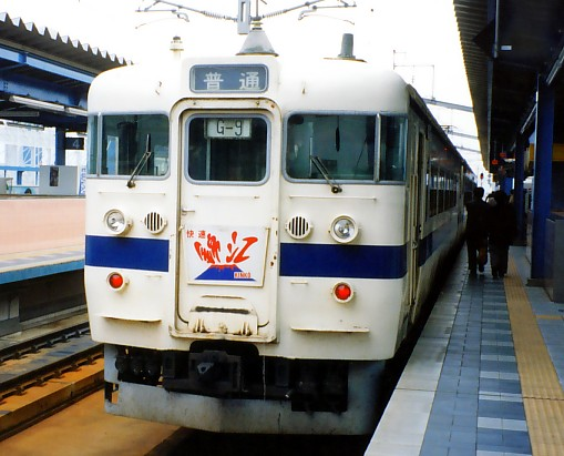 快速錦江